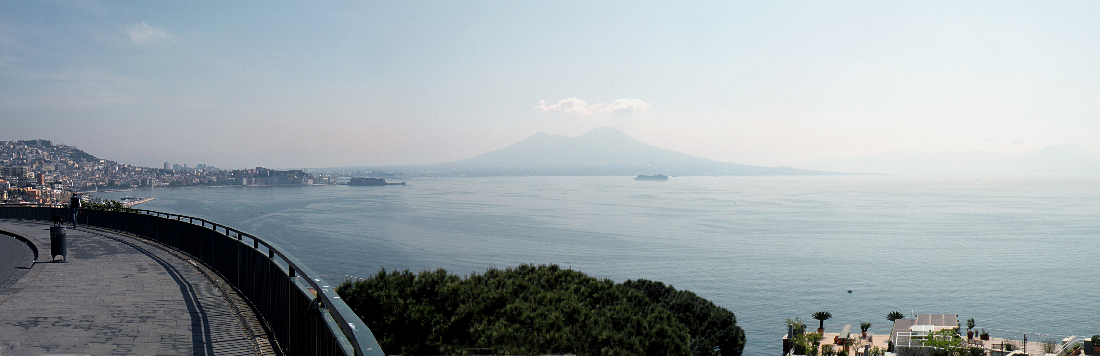 Naples bay